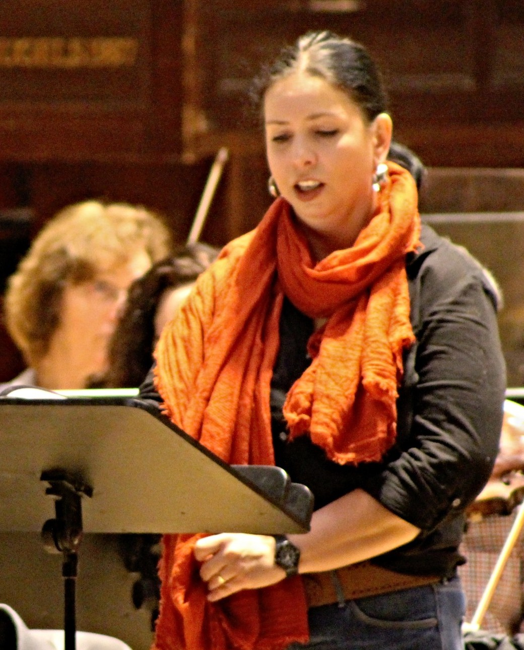 Orchestrální zkouška Dvořákova oratoria Stabat mater ve Smetanově síni Obecního domu v Praze